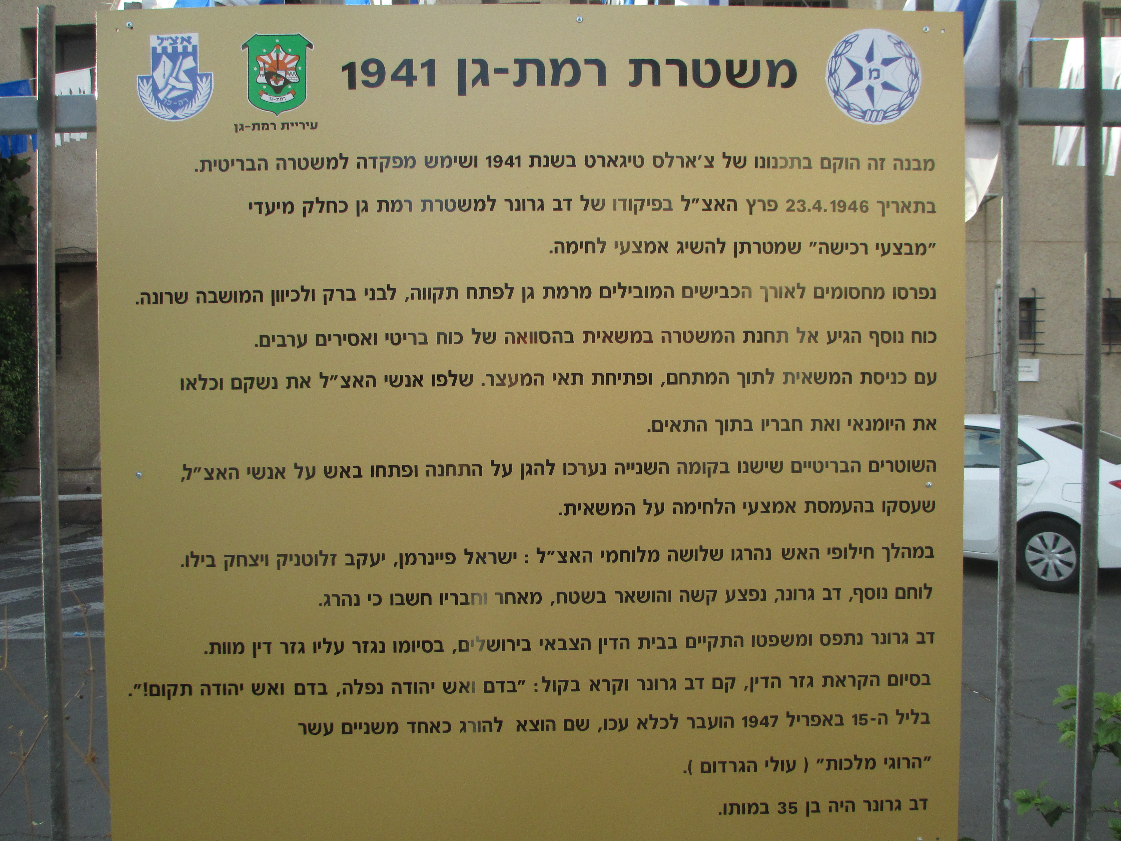 לוחית זיכרון של אצ"ל בכניסה למשטרת רמת גן, רחוב ז'בוטינסקי